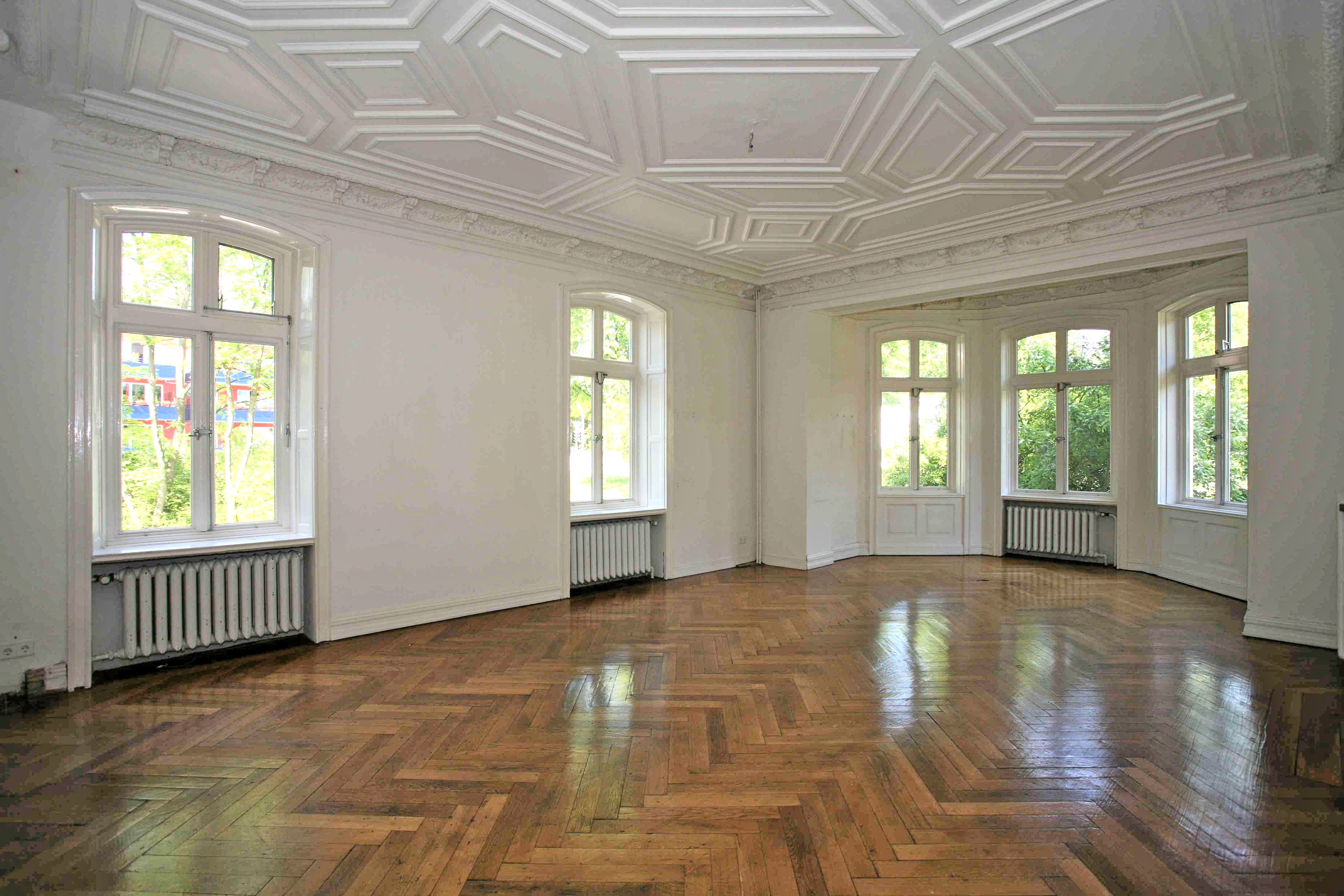 Bovehaus Hamburg-Wandsbek, Innenansicht, Bildspende von Architekturbüro Bernd Lietzke